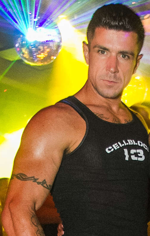 2012.07.29_Play_101